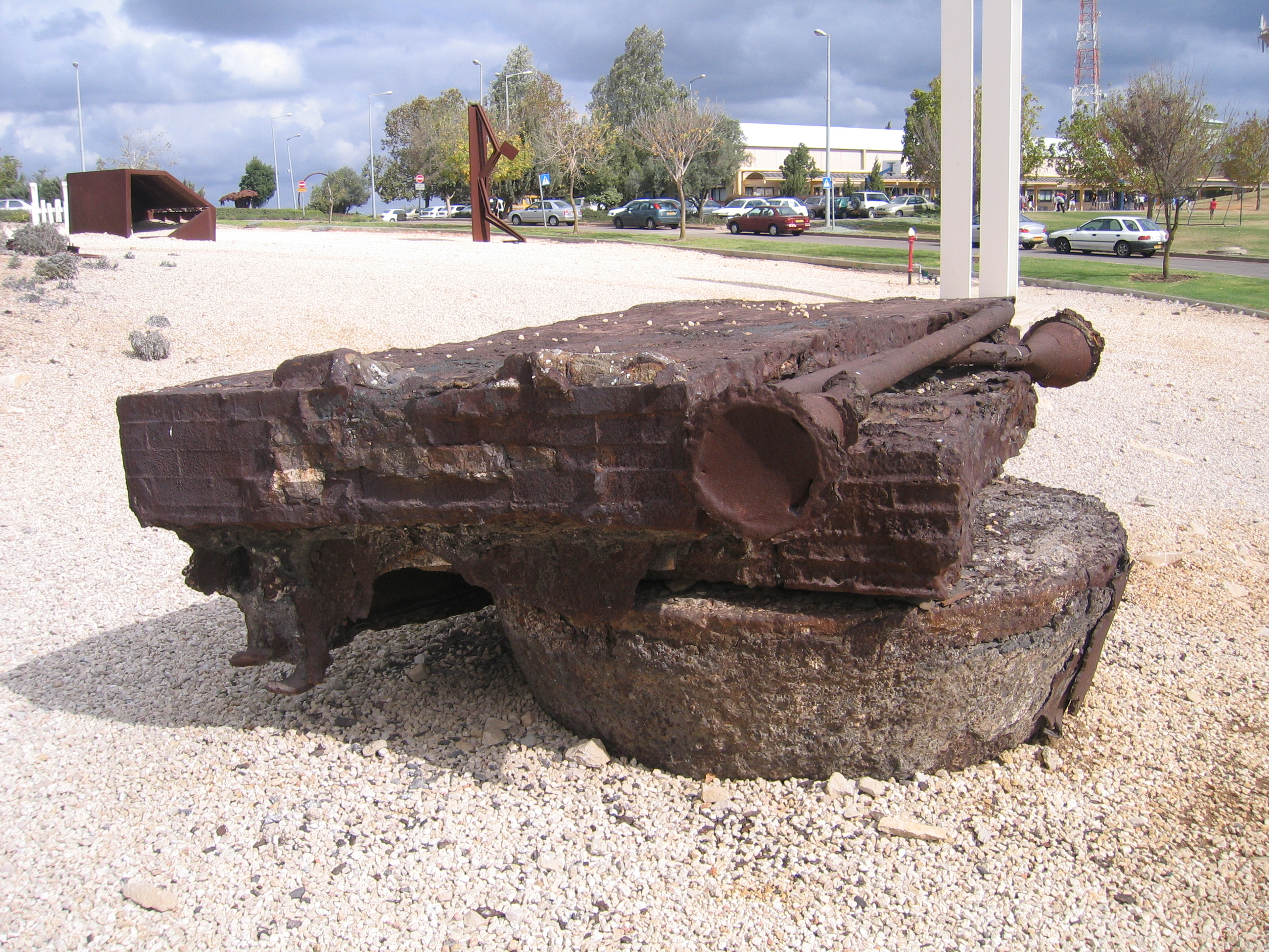 יעקב דורצ'ין, טובה מרום (1994), פלדה, 250/330/133. Ya'acov Dorchin, Tuba Merum (1994), steel, 133/330/250 cm.